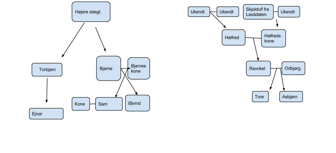 Ravnkels slægt og Sam og Torbjørns slægt.